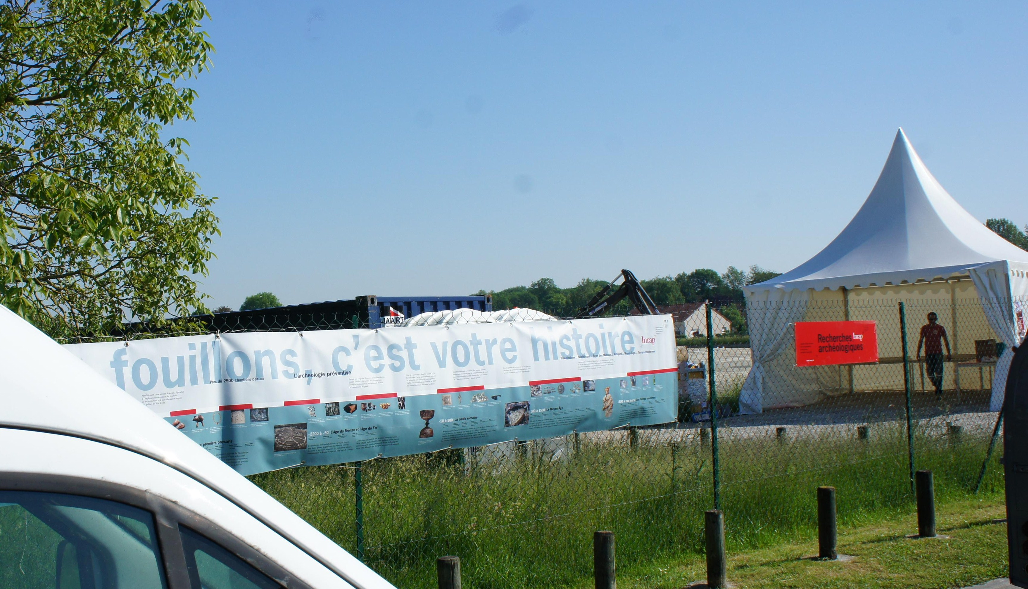 Fouilles à Bezannes lors des Journées nationales de l’Archéologie .